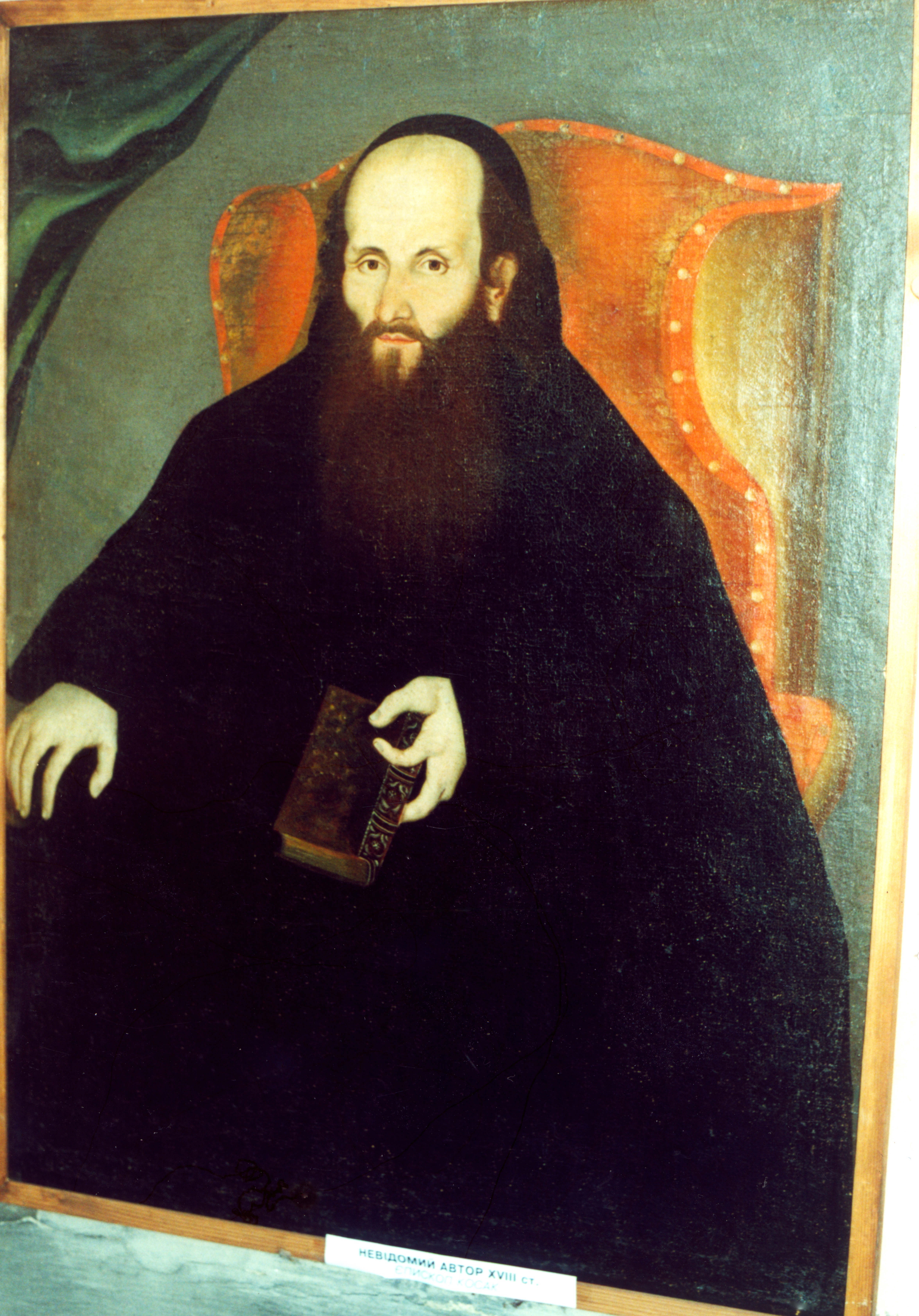 Коцак Арсеній, ЧСВВ Scanned and uploaded by Jozafát Vladimír Timkovič, OSBM. Picture was repaired on photoshop by Gorazd Andrej Timkovič, OSBM